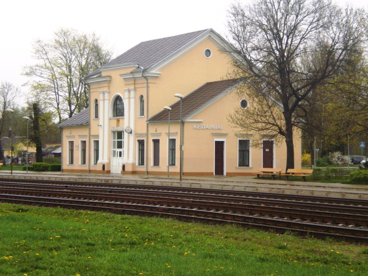 Kėdainių geležinkelio stotis